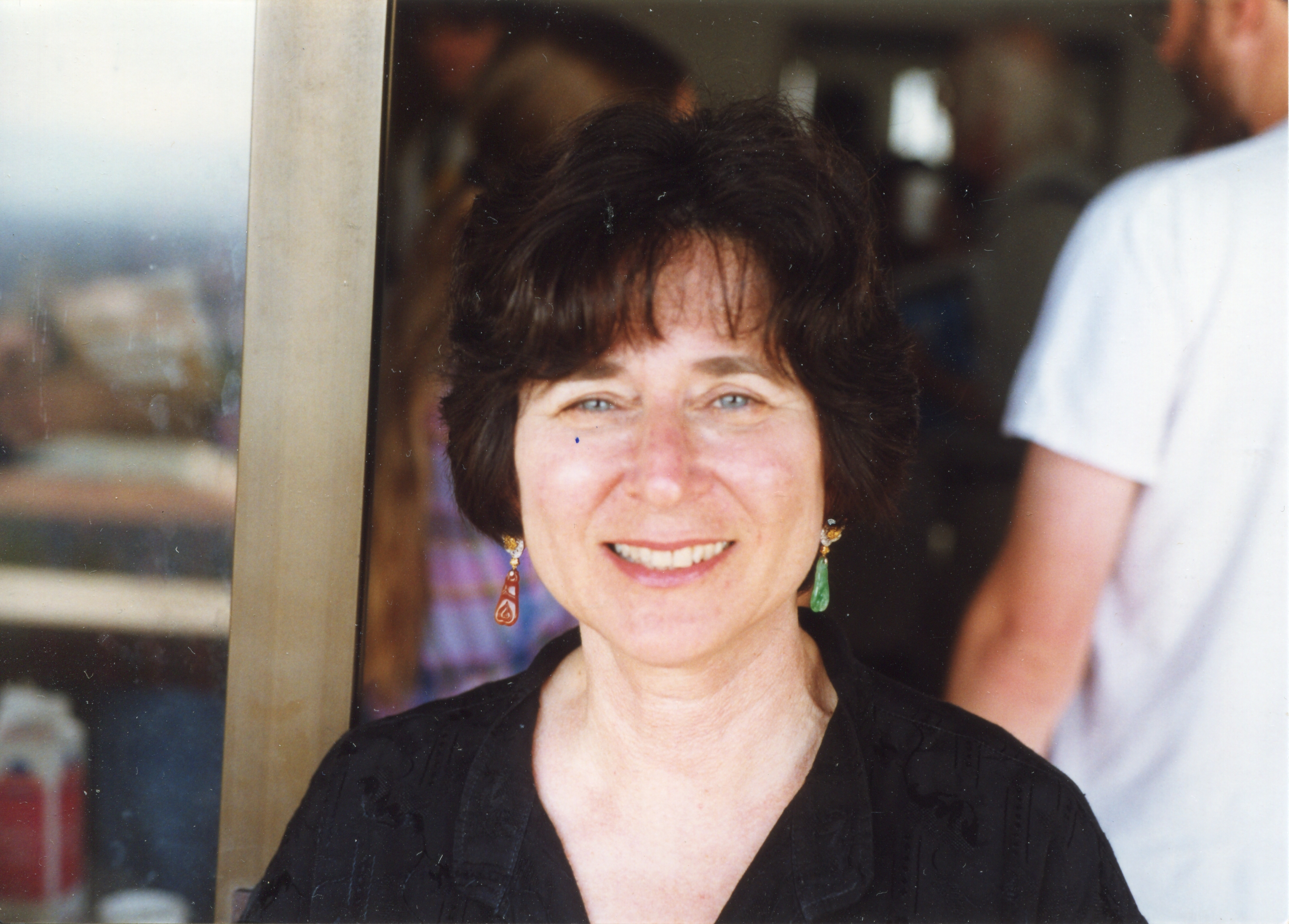 Foto di Lenore Blum